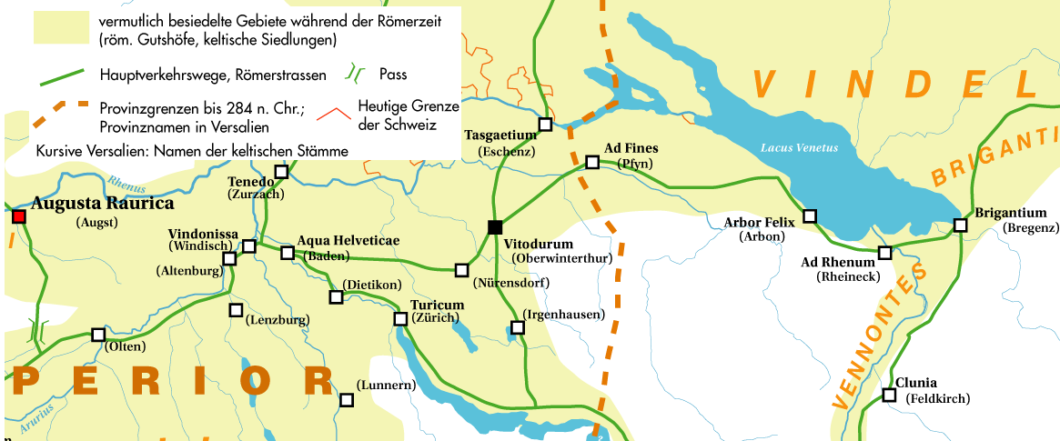 Ausschnitt_aus_Historische_Karte_CH_Rom_1.png